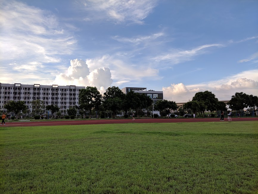 中文（中国大陆）: 广东第二师范学院的花都校区操场一景,于操场的足球场西北角所拍。自己用手机于广东第二师范学院操场散步时所拍, 拍后无后期处理直出的图片。